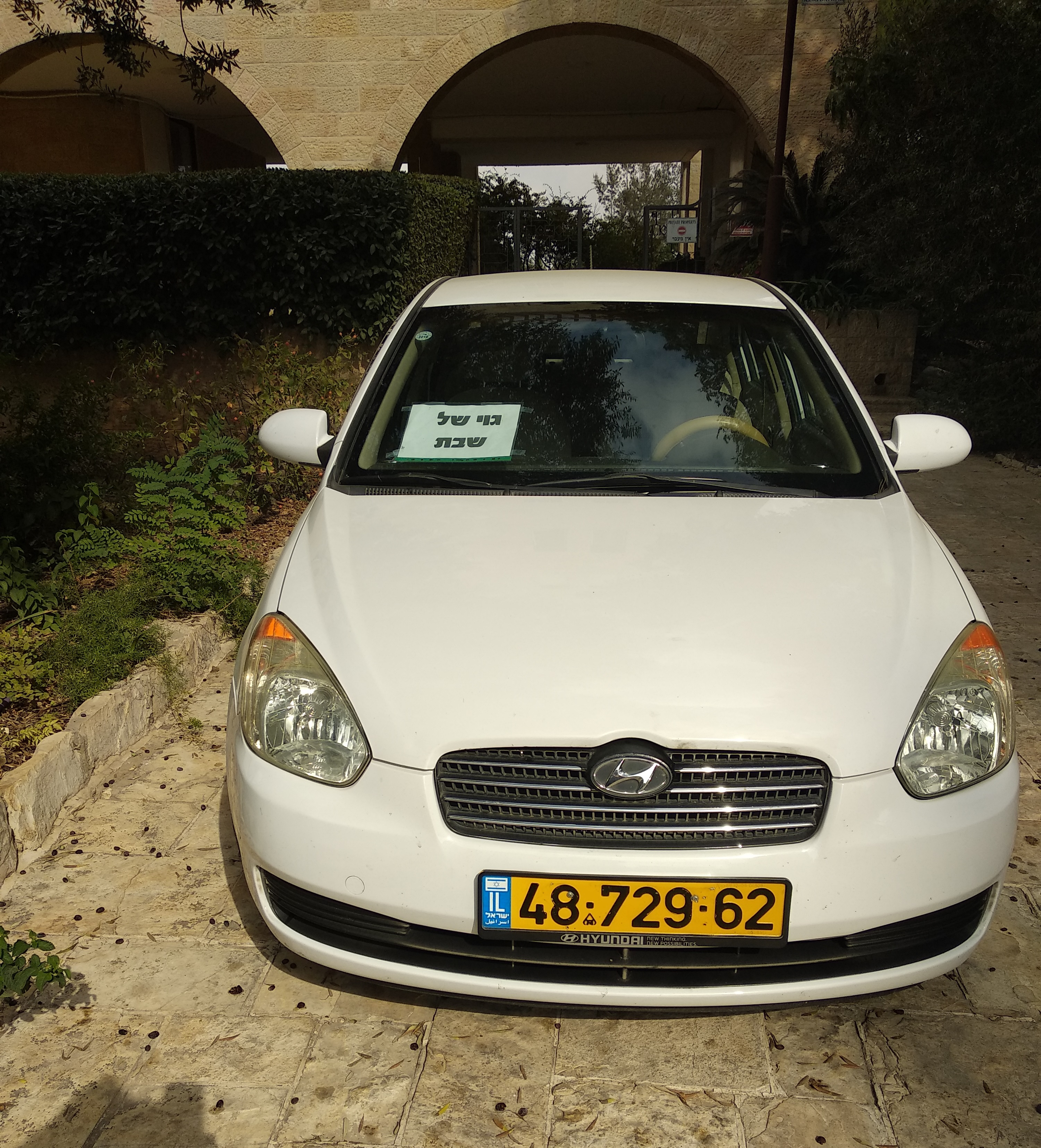 מכונית בירושלים המעידה על עצמה שהיא של גוי של שבת